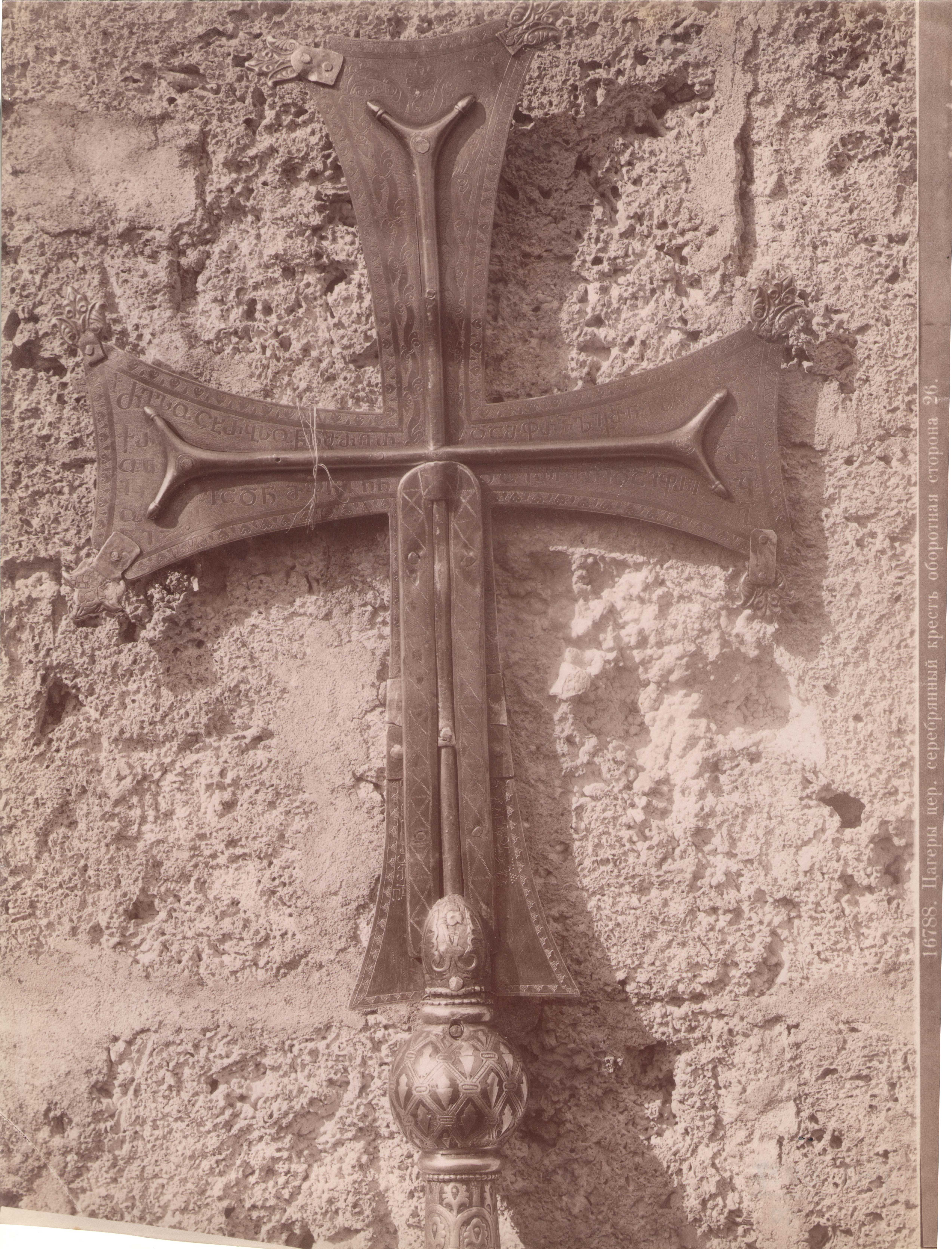 იშხნის საწინამძღვრო ჯვარი